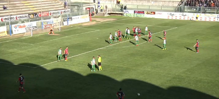 Vigor Lamezia - Cosenza (29 - 03 - 2015)